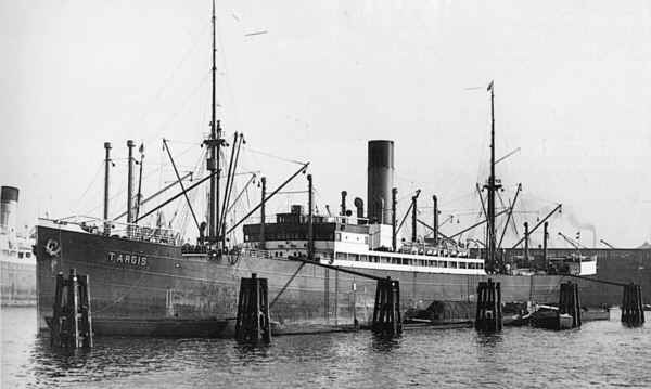 Der Dampfer TARGIS des NDL, der als Wolfram für die HBAL vom Stapel lief